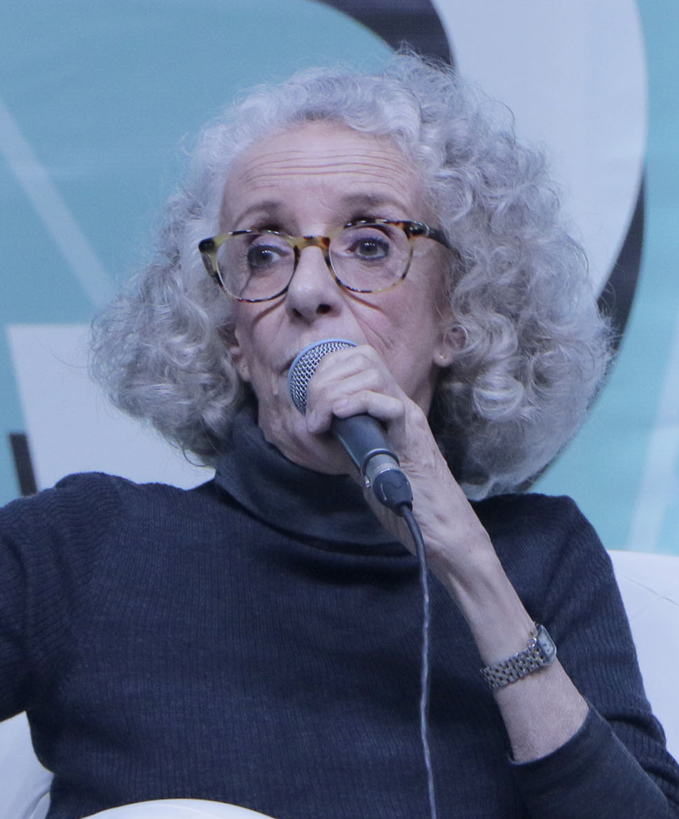 Martes 17 de octubre de 2017. En el marco de la XVII Feria Internacional de Libro en el Zócalo, se presentó el libro La interrupción legal del embarazo. El caso de la ciudad de México de Marta Lamas (Fondo de Cultura Económica). Con la participación de la autora y Rocío Martínez Fotografía: Tania Victoria/ Secretaría de Cultura CDMX